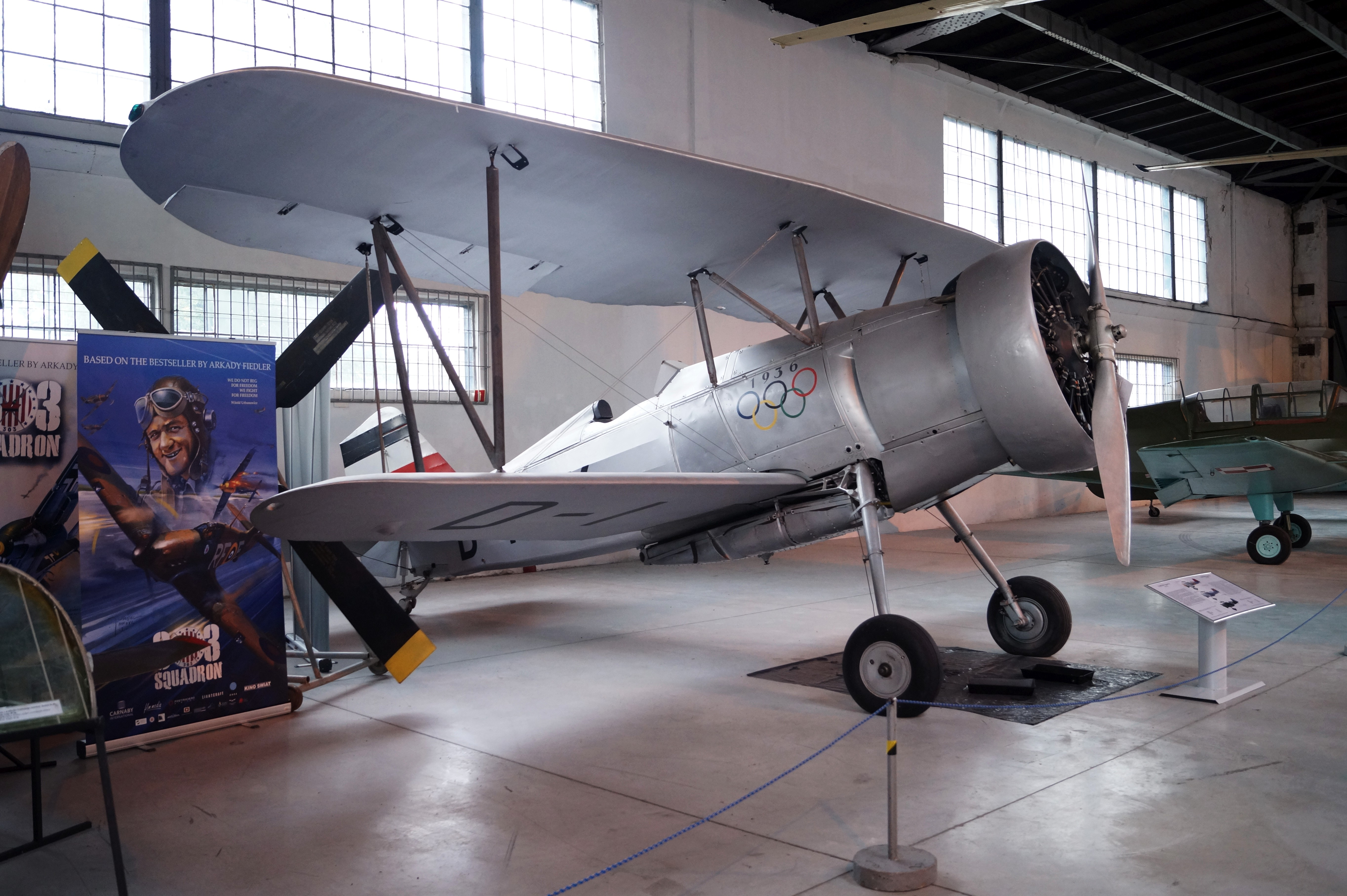 This photo was taken during Automotive Wikiexpedition 2016 set up by Wikimedia Polska Association. You can see all photographs in category Wikiekspedycja motoryzacyjna 2016. English | Polski | +/− Curtiss Export Hawk II w Muzeum Lotnictwa Polskiego w Krakowie